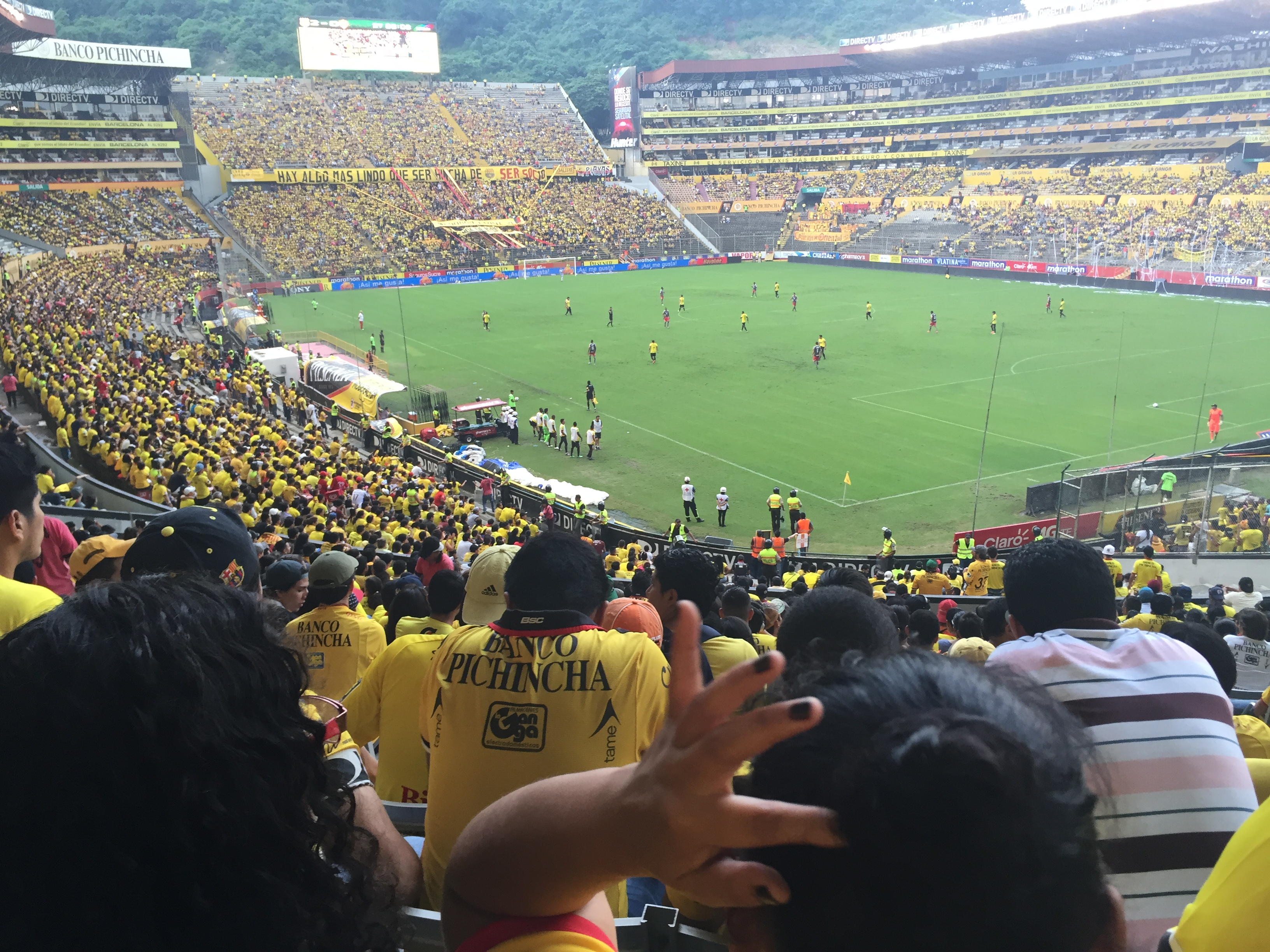 Estadio Monumental vista desde Palco 1